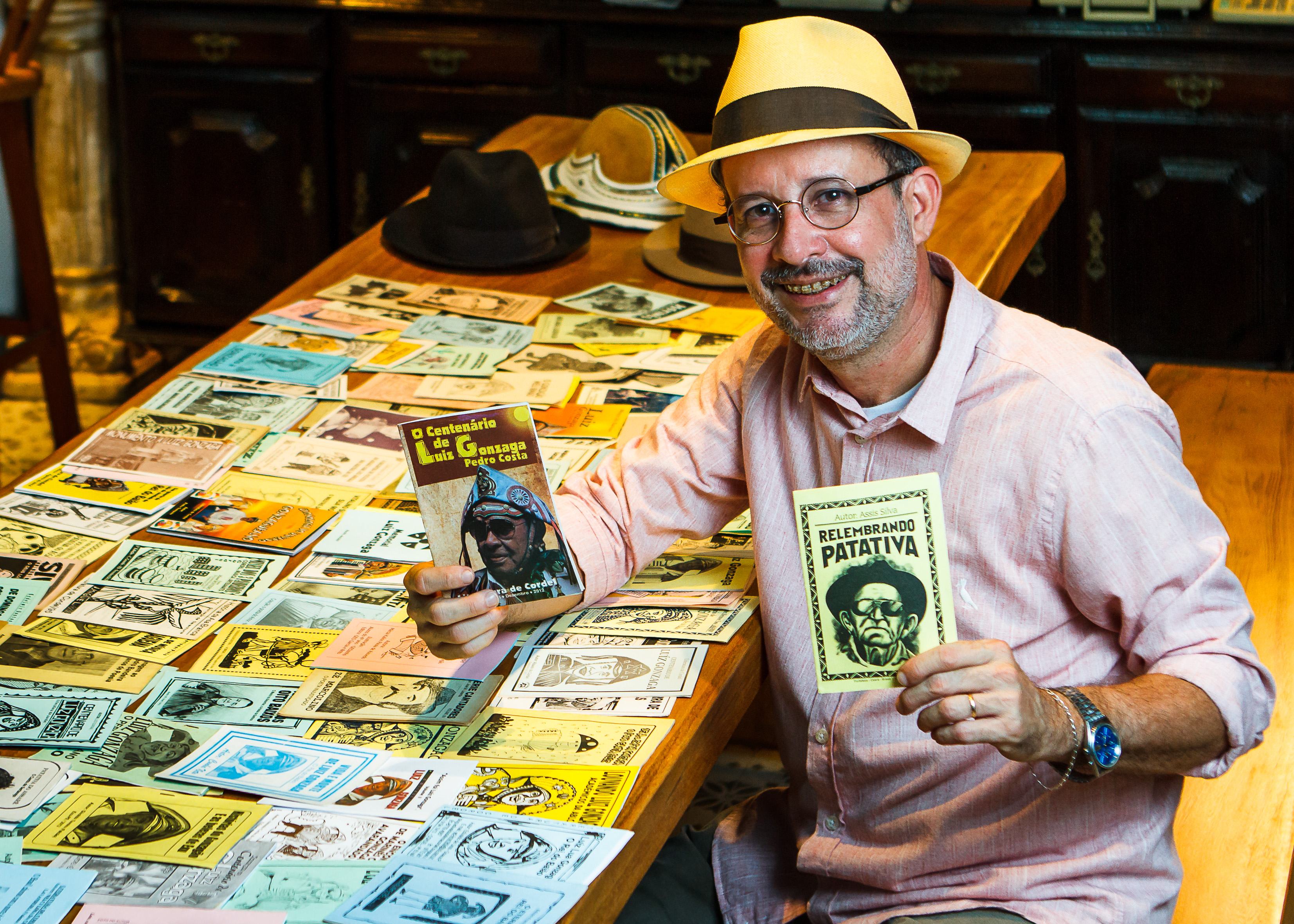 Wilson é membro da Academia Piauiense de Literatura de Cordel e da Academia Brasileira Literatura de Cordel.